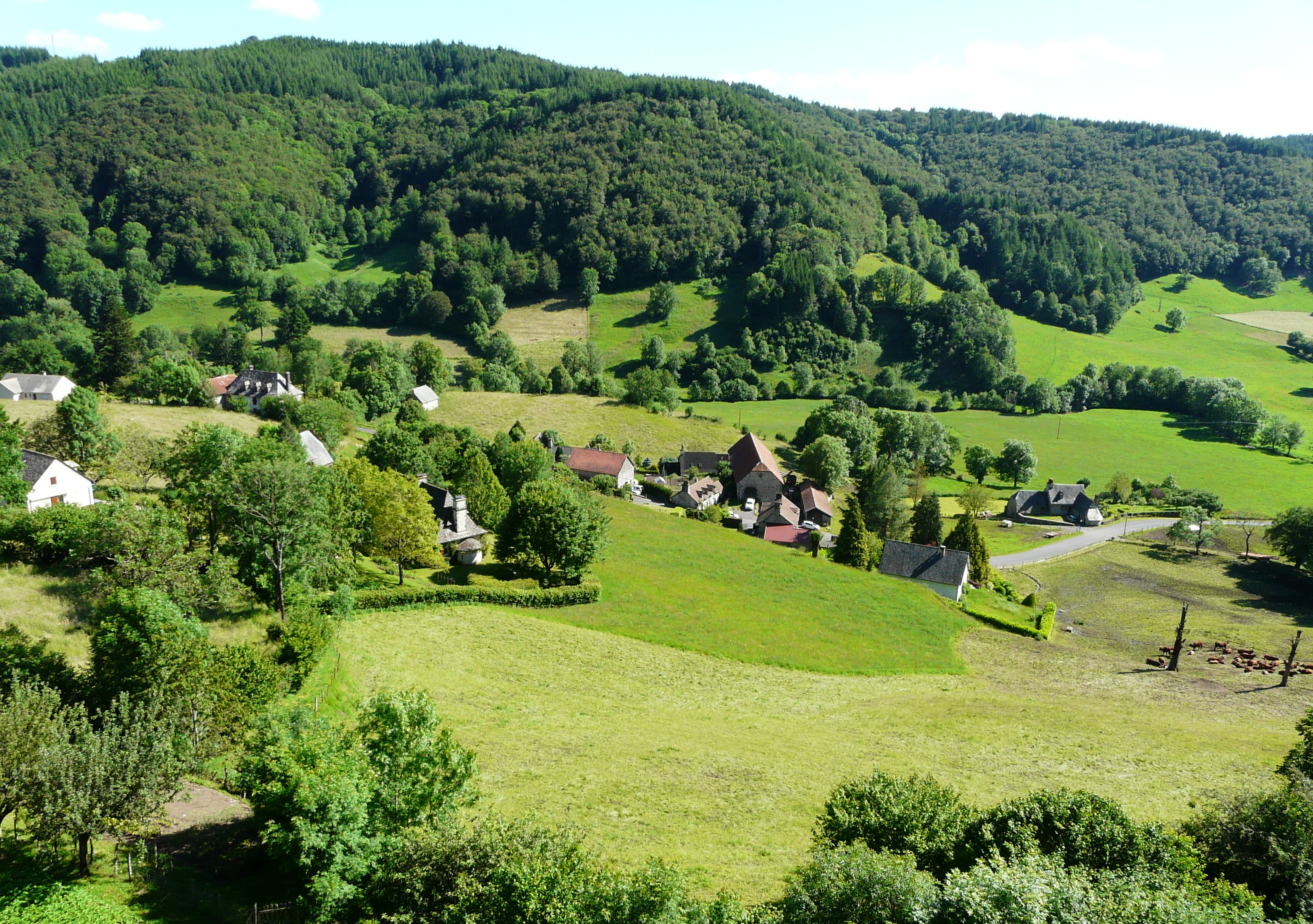 La vallée de la Doire à Tournemire, Cantal, France.